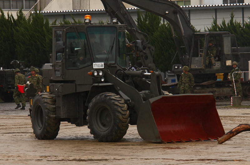 第10施設大隊本部管理中隊のバケットローダ